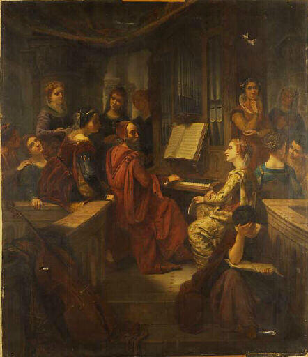 Peinture représentant Palestrina et ses élèves. Huile sur toile conservée au Musée des beaux-arts de Chambéry